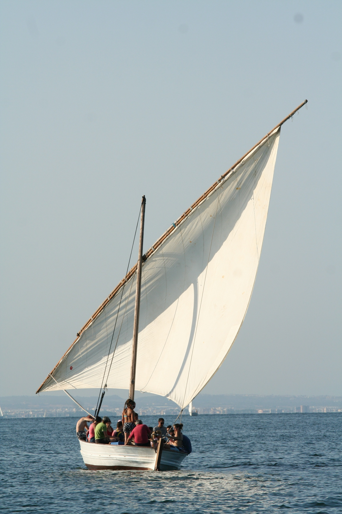 la fotogradia muestra una excursion en barco latino de 42 palmos, navegando por las aguas del mar menor dirección a la isla de la perdiguera. Más información en